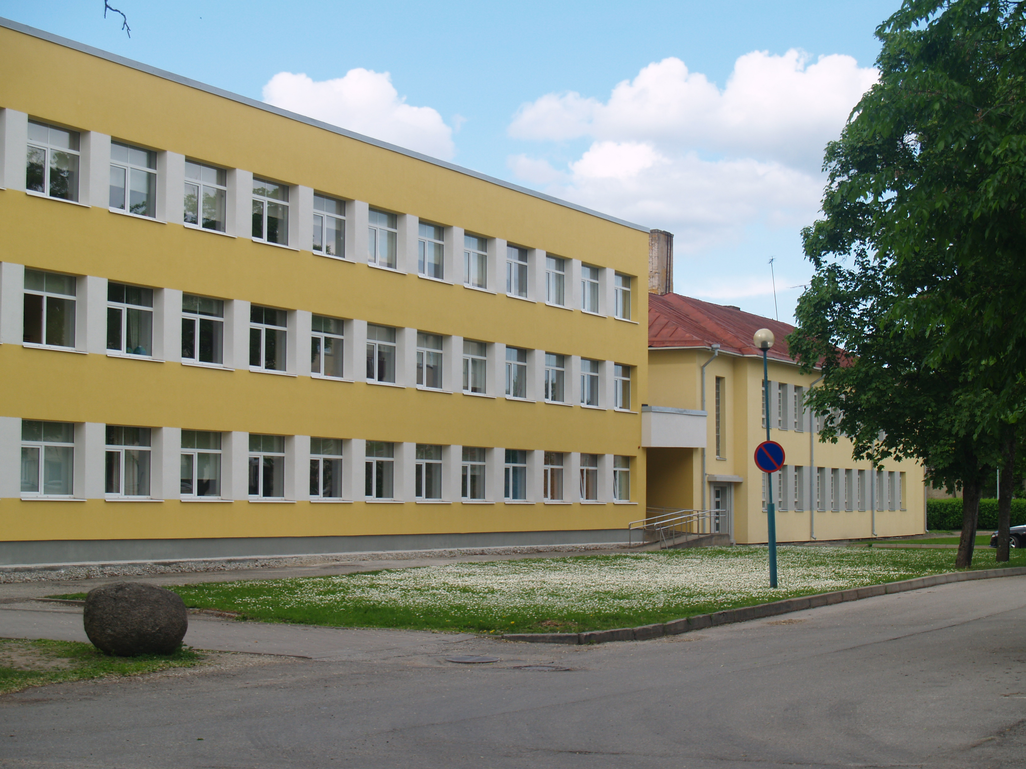 Põltsamaa vaated